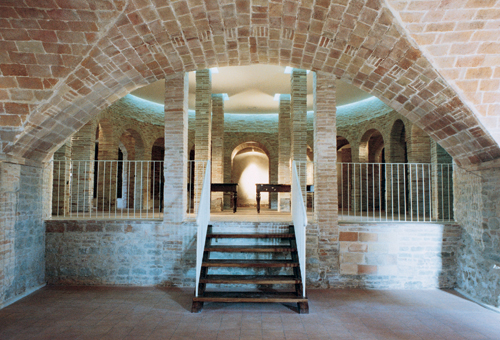 Interno del Museo Civico e della Mail-Art di Montecarotto.